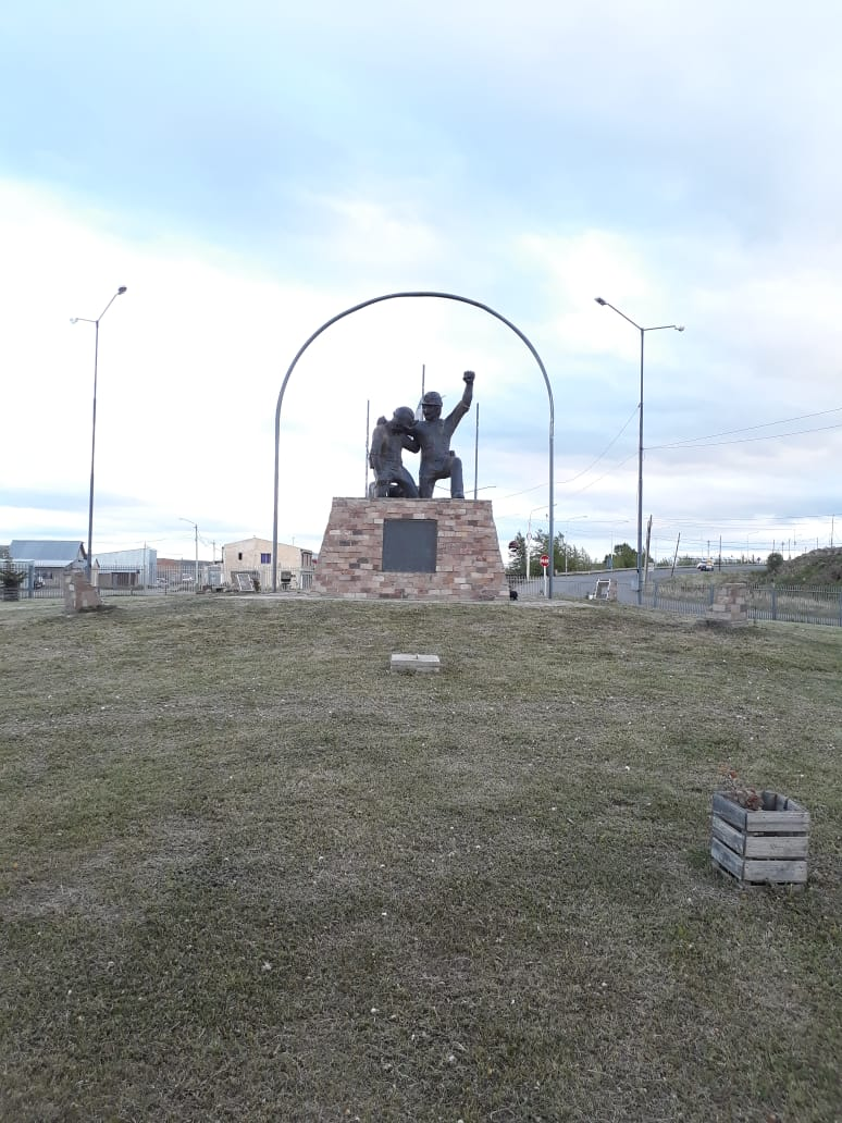 Foto tomada en la localidad de 28 de Noviembre, monumento en homenaje a los 14 mineros fallecidos el 14 de junio.